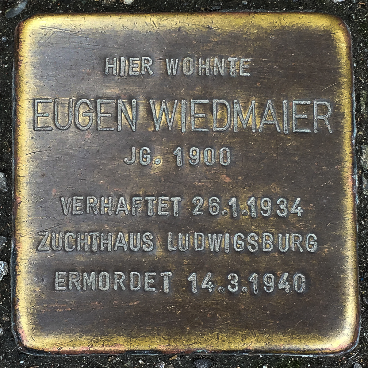 Stolperstein, Eugen Wiedmaier, Marconistr. 23 in 70435 Stuttgart.